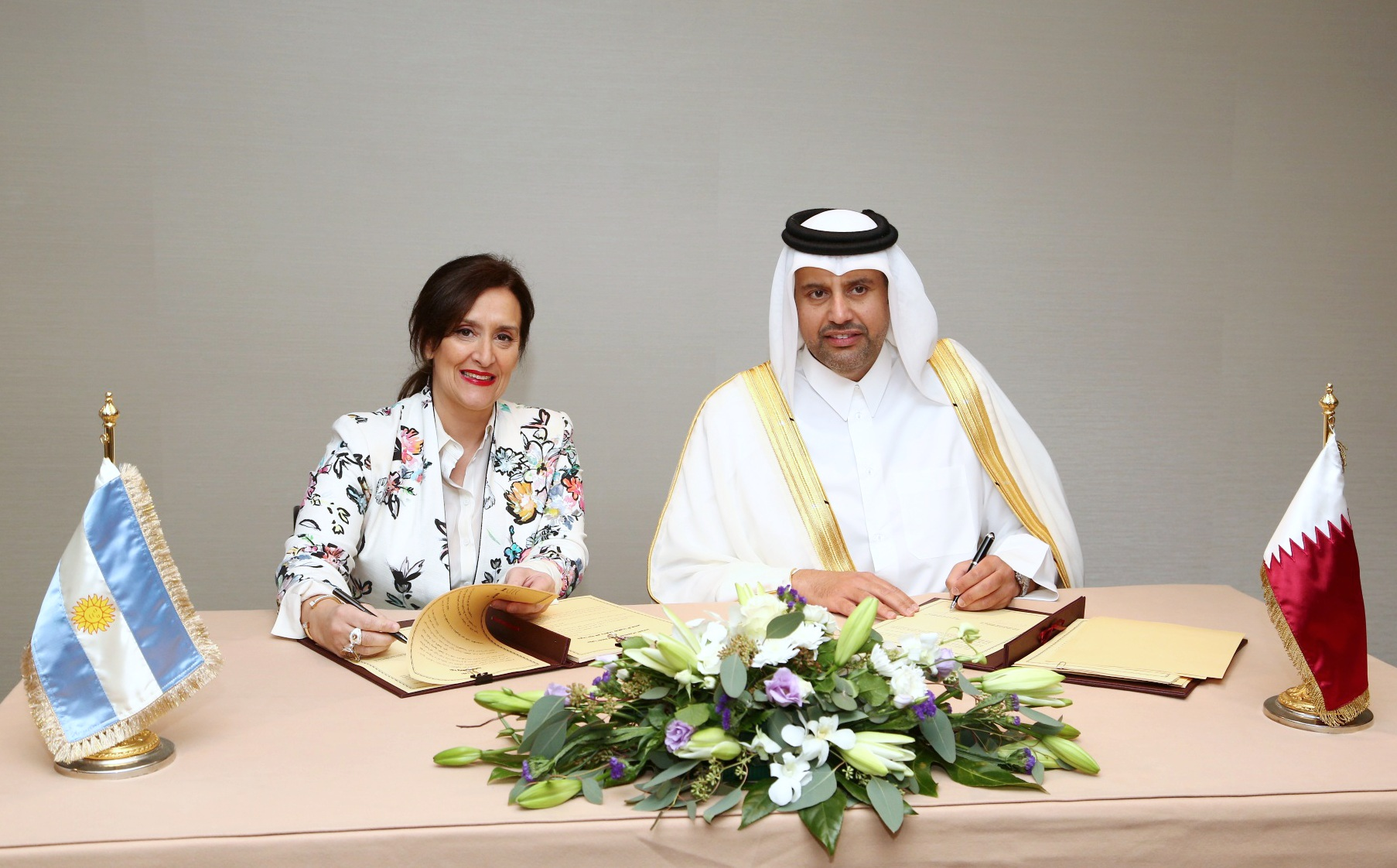 La Argentina y Qatar acordaron crear un fondo conjunto por 1000 millones de dólares para la realización de obras de infraestructura en el país.